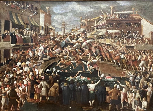 Realizada en Venecia, en el tercer cuarto del SXVII, esta "Batalla en el puente de los puños" es una de las obras cumbre del maestro alemán Joseph Heintz el Joven (1600 - 1678), afincado en Italia desde las primeras décadas del siglo.